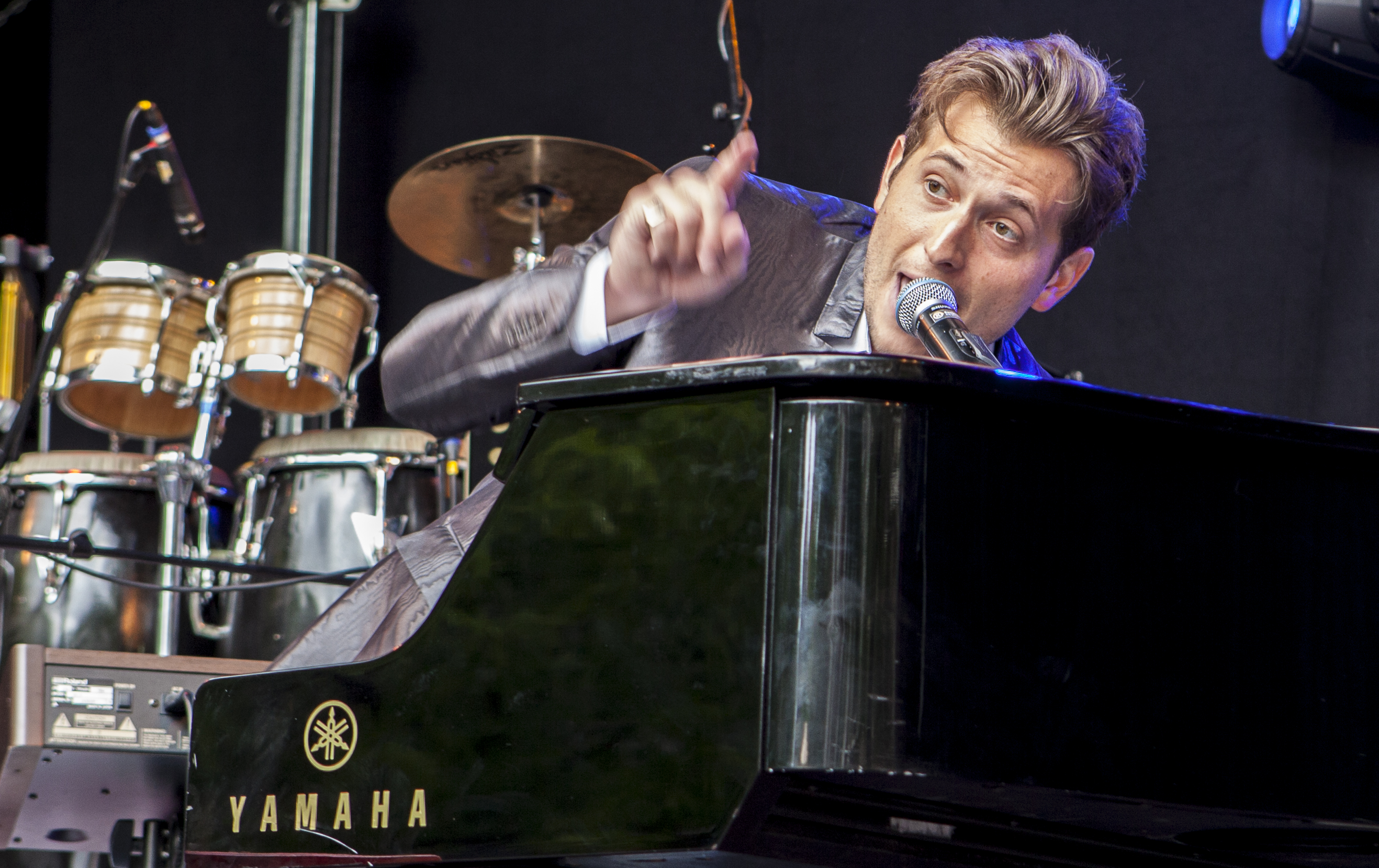 Optreden van Peter Cincotti aan de vooravond van The Hague Jazz op de Grote Markt te Den Haag.